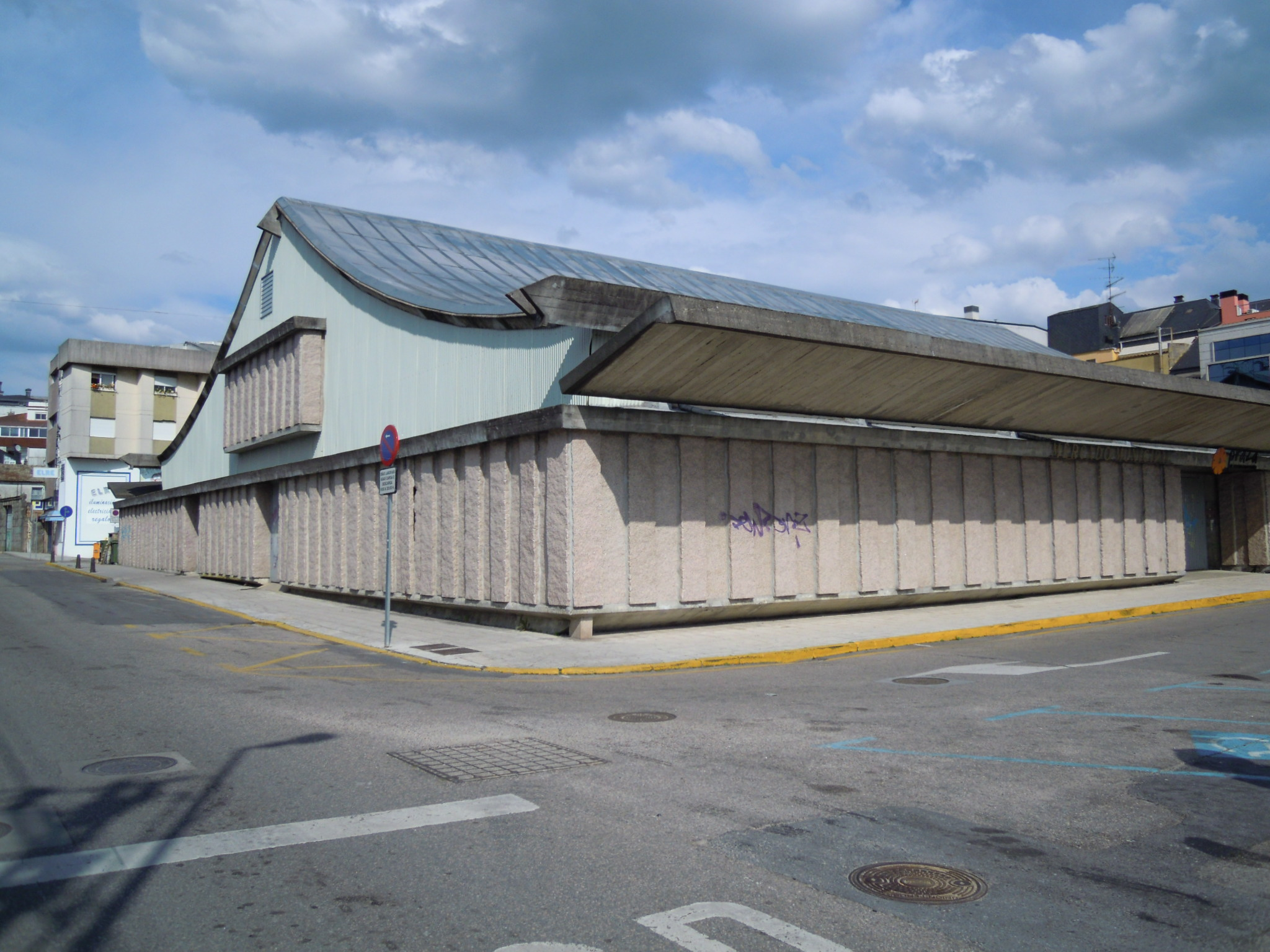 Mercado do Porriño, construído en 1970 con deseño de Xosé Bar Boo. Ubicado na Praza de Abastos.